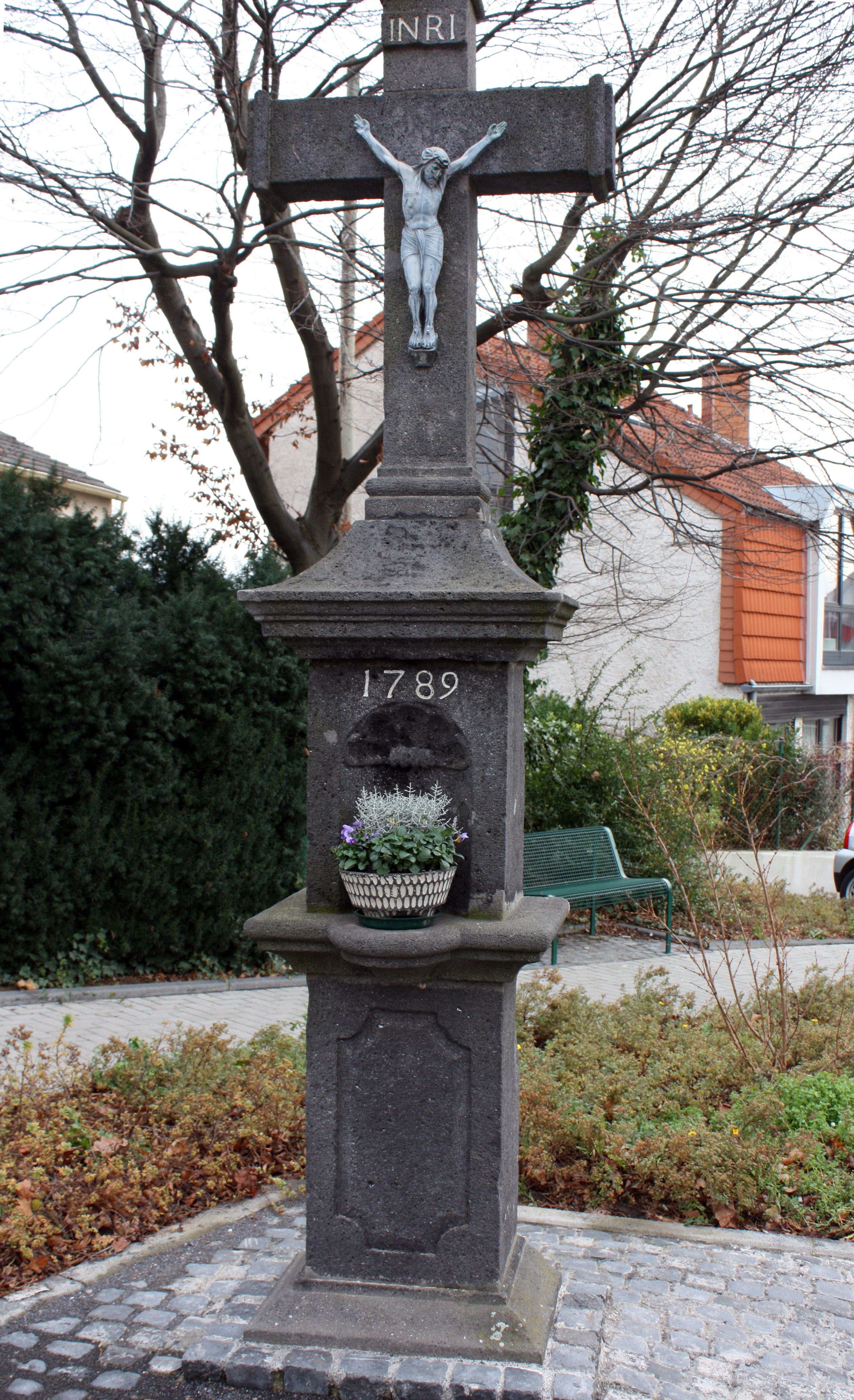 Hürth-Fischenich, Wegekreuz Vochemer Straße / Schmittenstraße von 1789